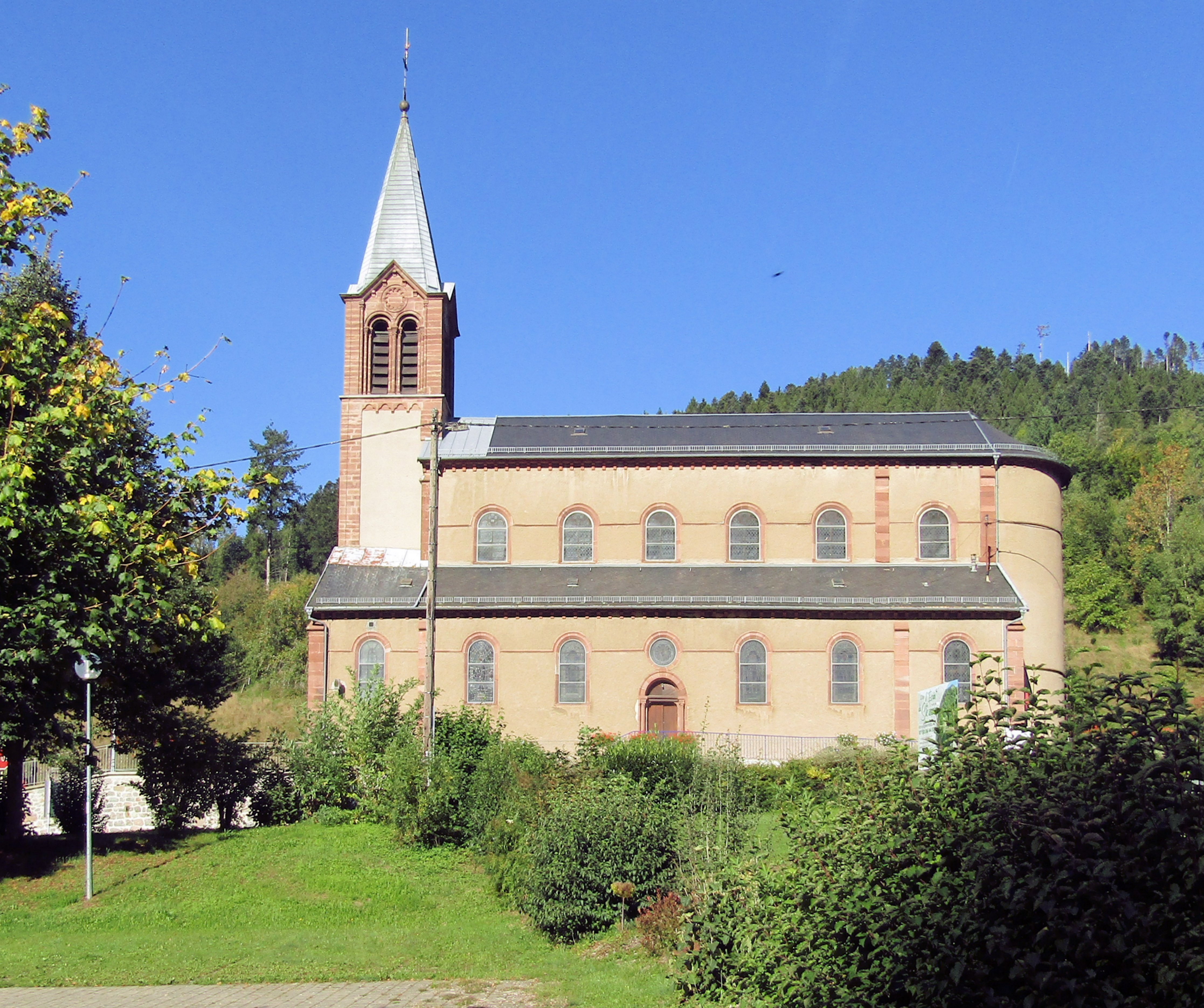 L'église Saint-Augustin à Rimbach-près-Masevaux